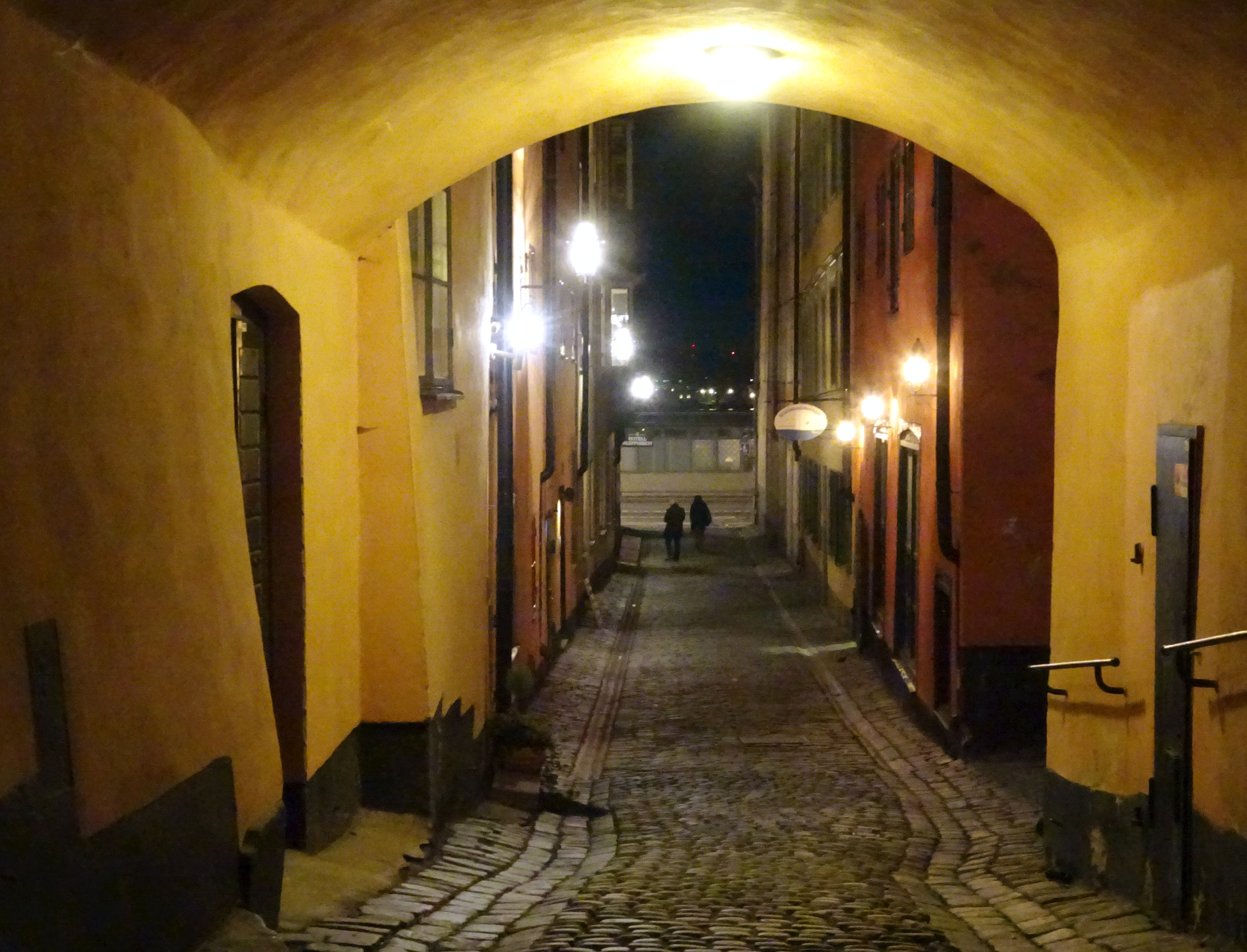 Ferkens Gränd, sedd från Österlånggatan